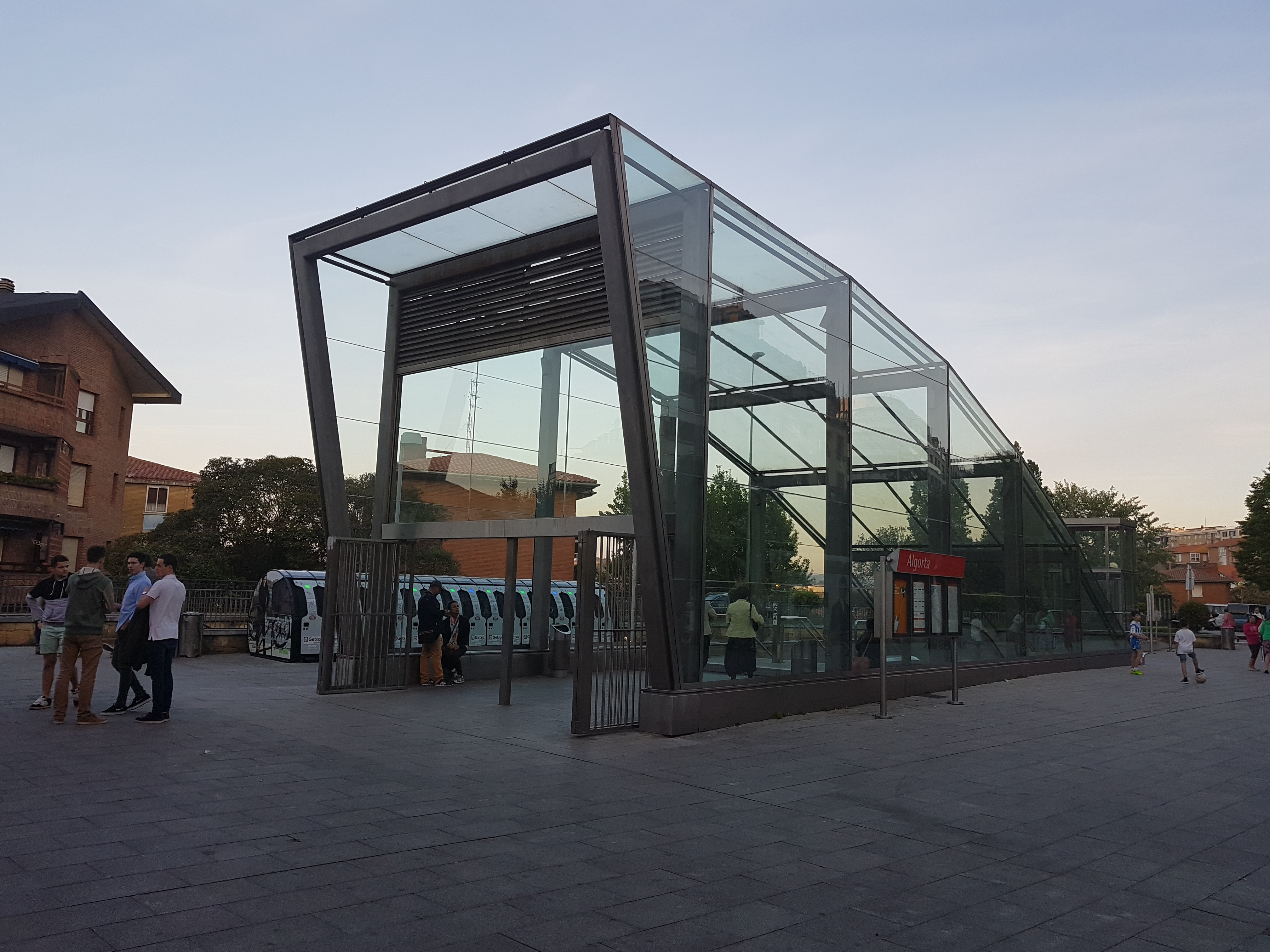 Estación de Algorta.